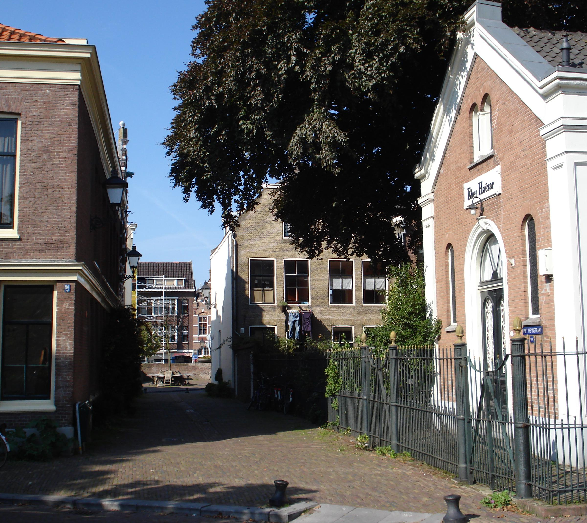 Piet Heynstraat, straat in Rotterdam Delfshaven. Geboortestraat van Piet Heyn.